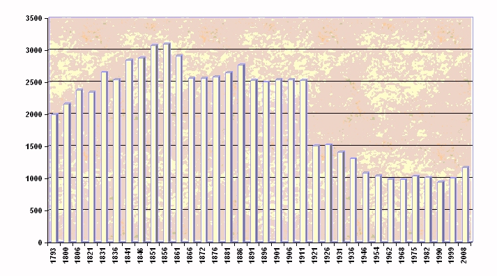 Thueyts (France) - Démographie de la population